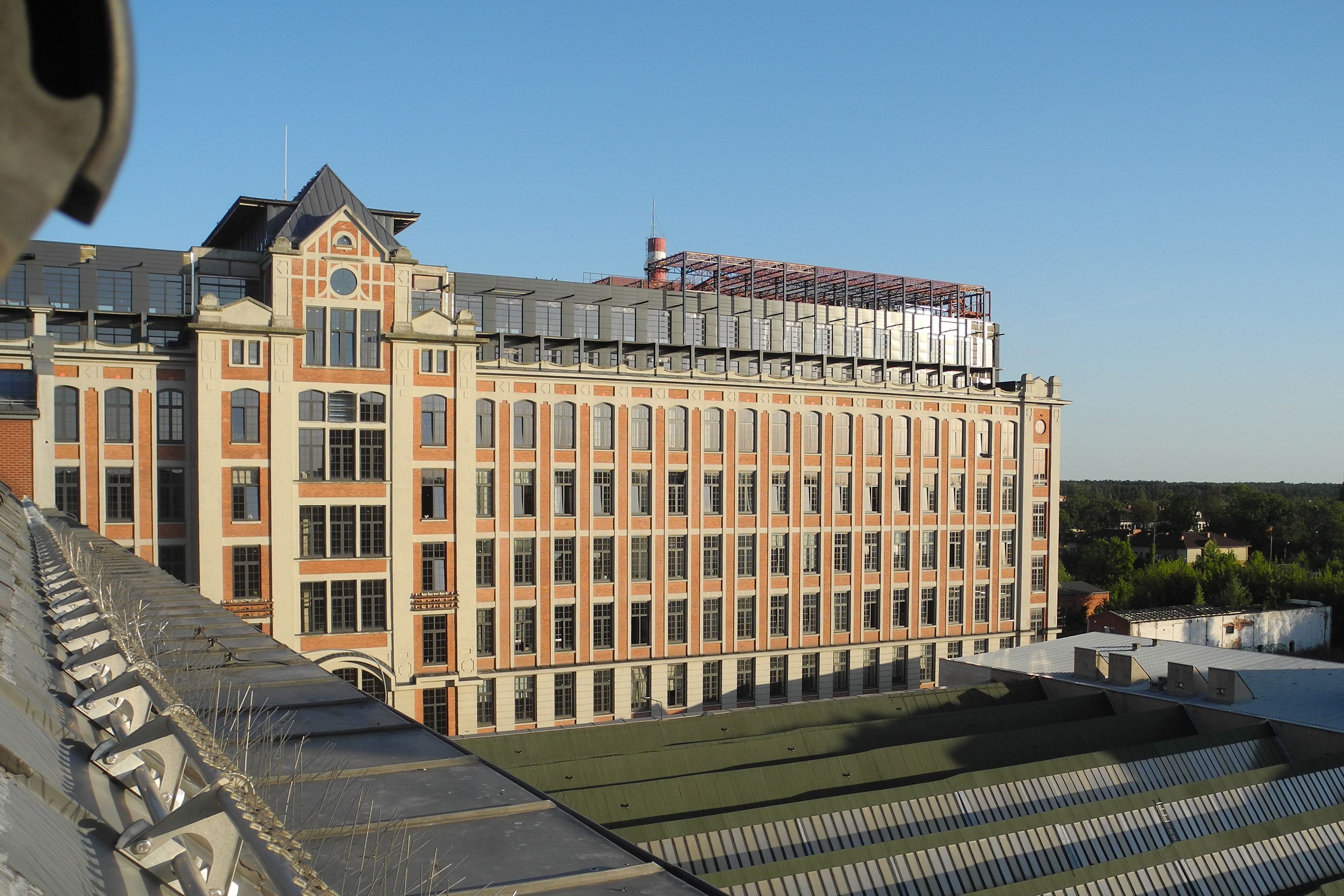 Neue Spinnerei – Nowa Przędzalnia in Żyrardów, errichtet 1910–1914, nach dem Umbau zum Wohn- und Servicegebäude 2007 bis 2009